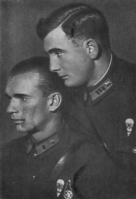 Леонид Григорьевич Минов (слева) и Яков Давидович Мошковский